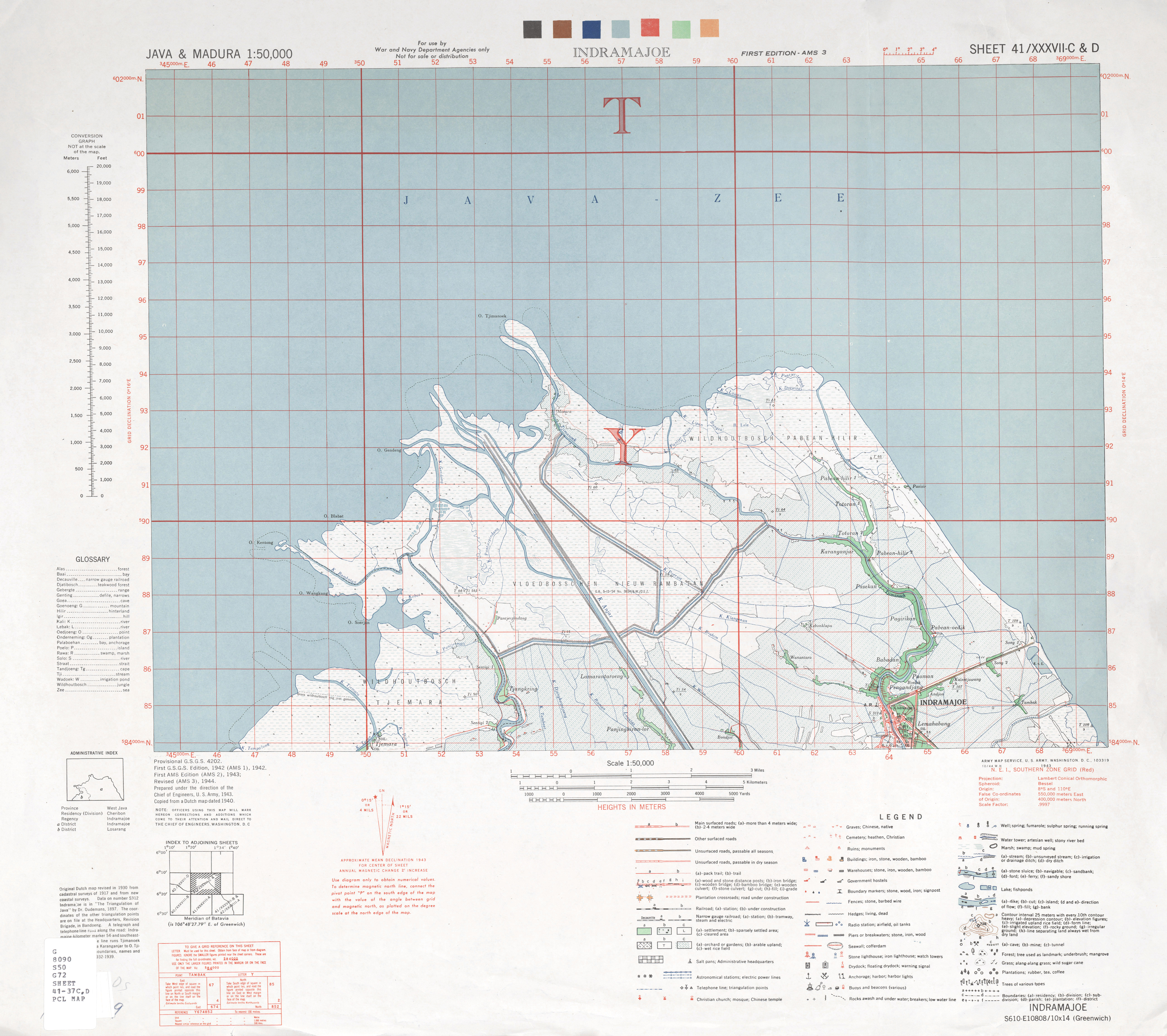 Peta Indramayu pada tahun 1940.